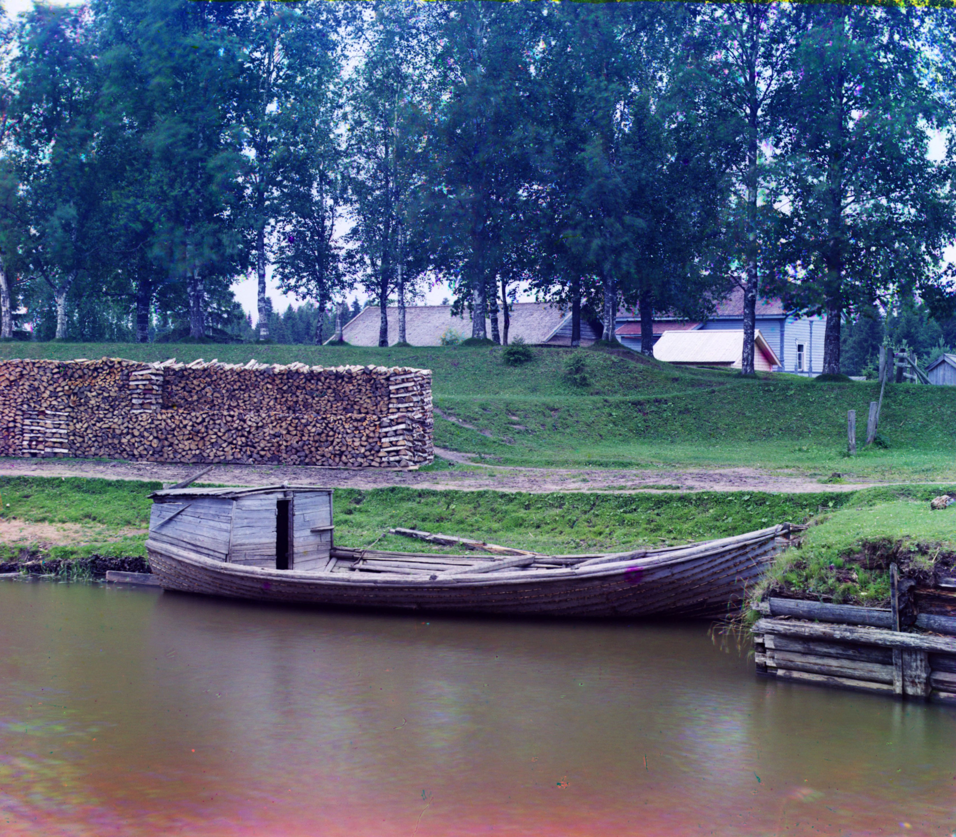 Трешкот, типичная лодка каналов северо-запада Российской Империи на фотографии С.М.Прокудин-Горского